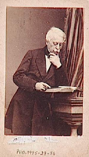 Portrait de Amédée Thayer (1799-1868), sénateur du Second Empire.